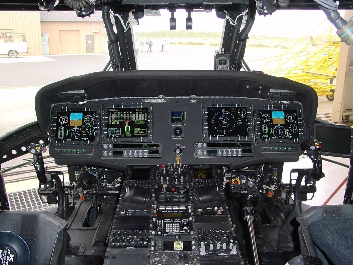 кокпит UH-60M